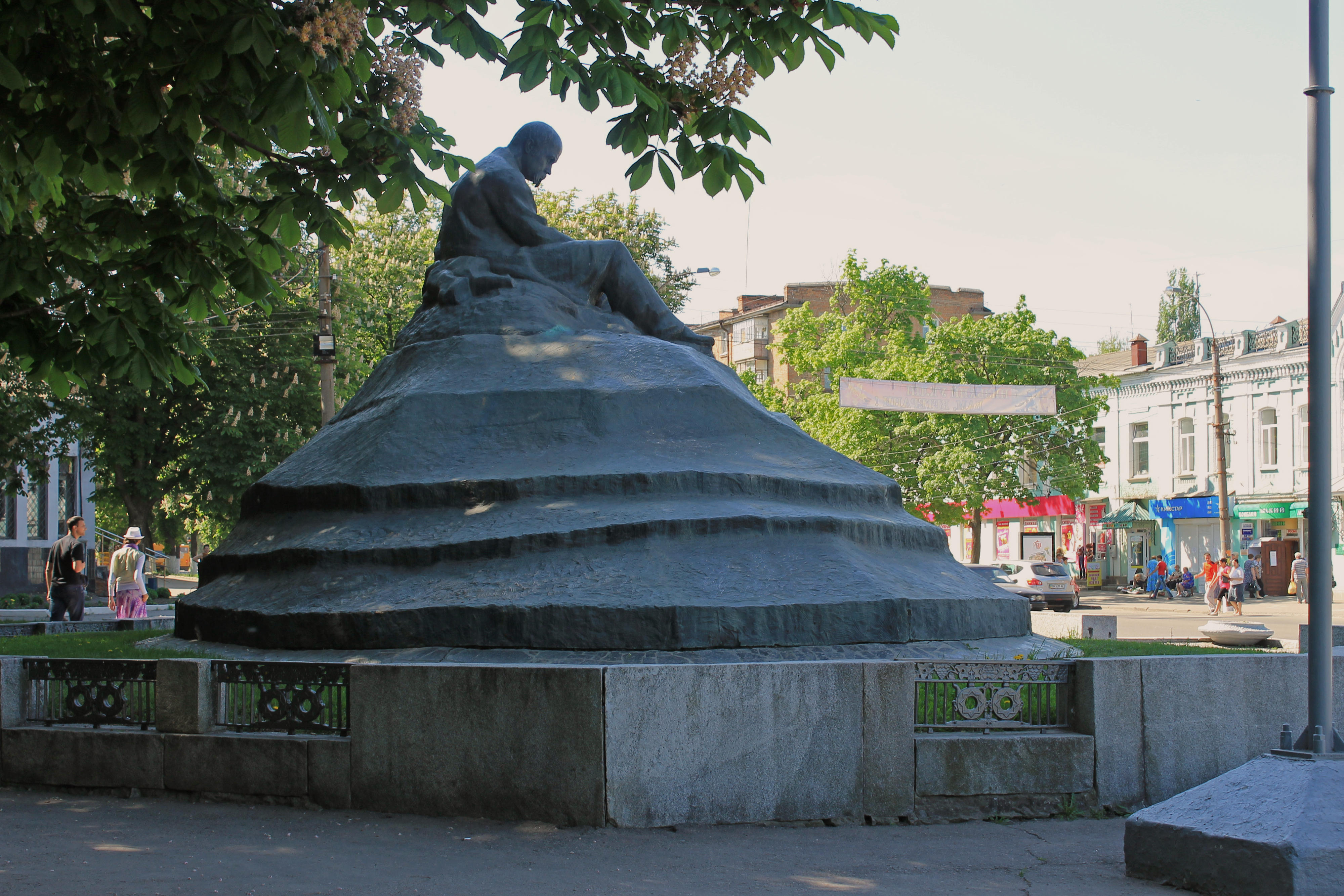 Пам'ятник Т. Г. Шевченку, Бульвар Шевченка, м.Ромни